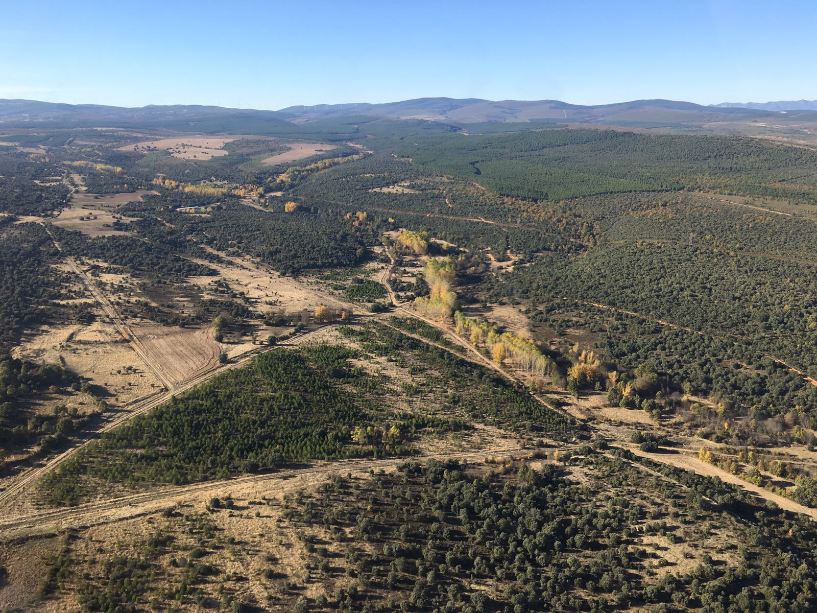 Valle del río Jerga en las cercanías de Santa Catalina de Somoza (León, España).